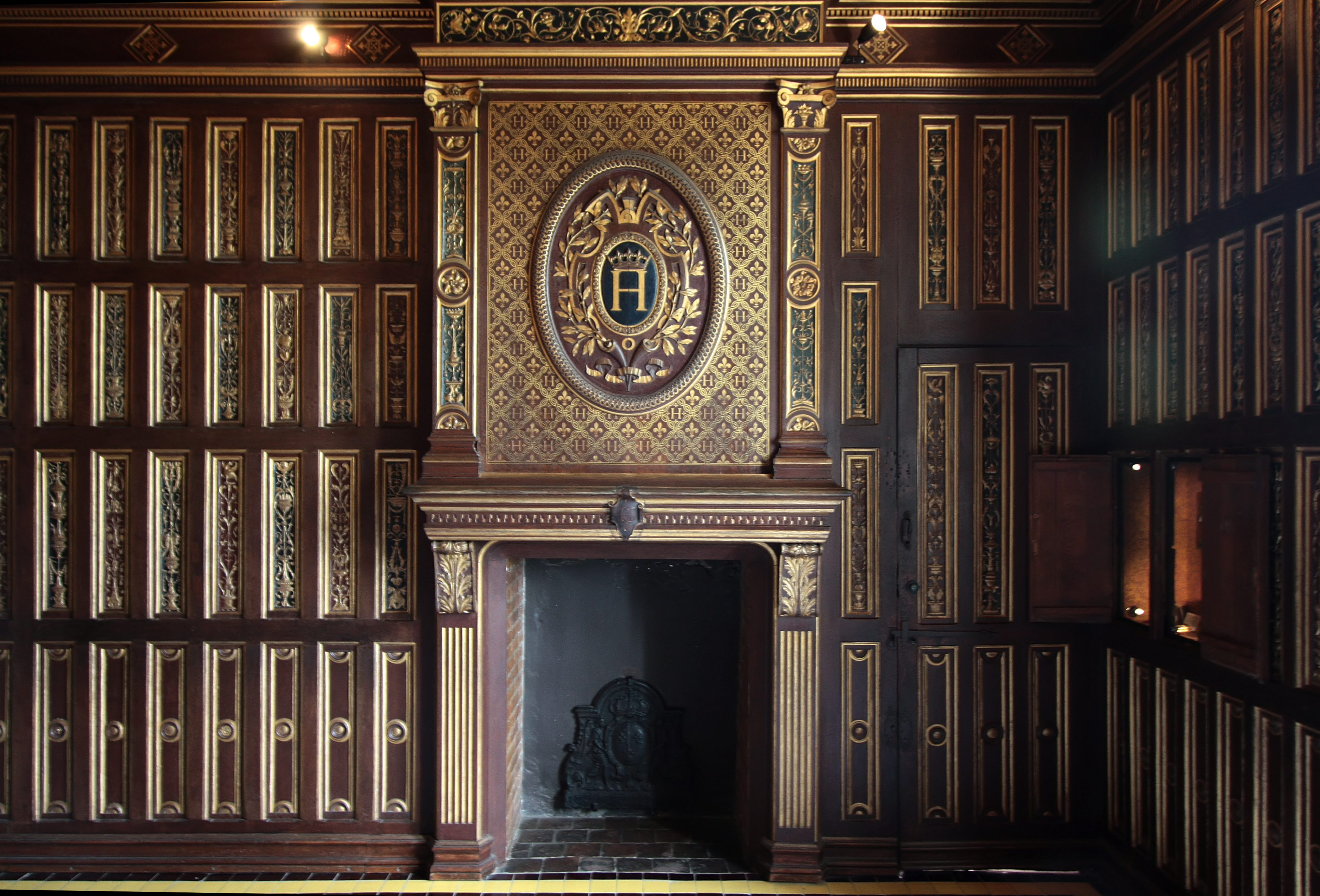 Schloss Blois, Departement Loir-et-Cher/Frankreich - das Kabinett der Königin mit seinen Geheimfächern ist der einzige Raum des Schlosses, der sein ursprüngliches Dekor behalten hat.